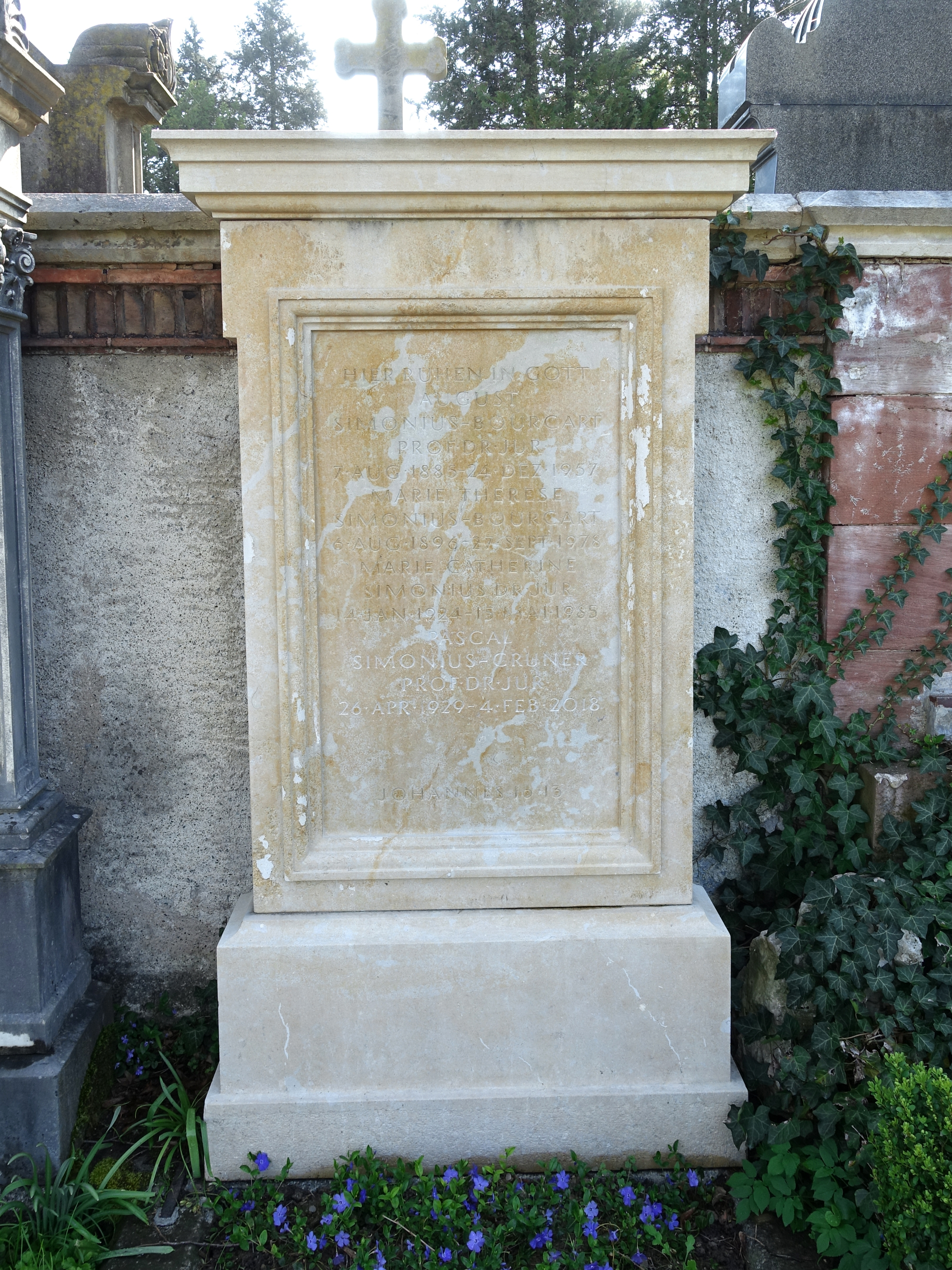 August Simonius-Bourcart (1885–1957) Jurist, Richter. Familien Grab auf dem Friedhof Wolfgottesacker, Basel